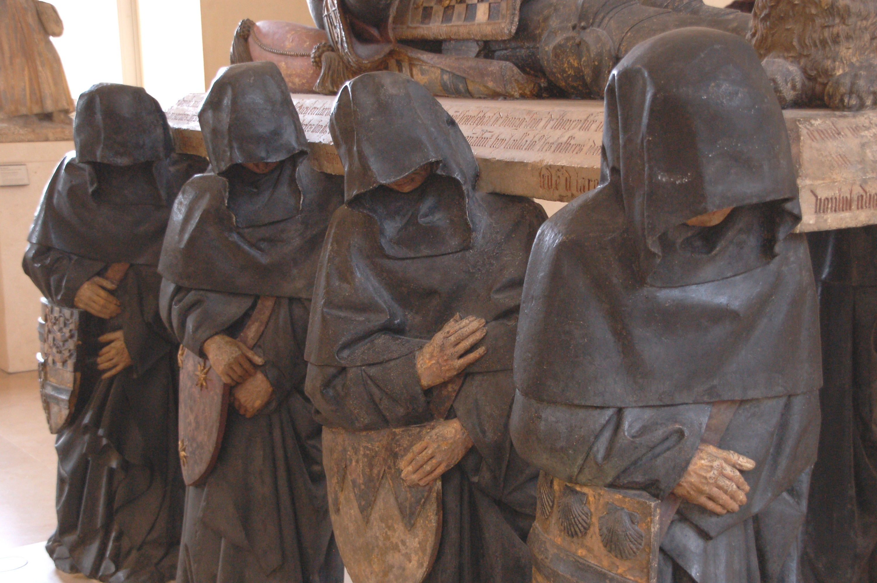 Musée du Louvre, Paris, France